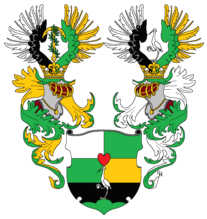 Wappen des österreichischen Germanisten, Historikers und Politikers Theodor Georg von Karajan (1810–1873), verliehen anlässlich seiner Erhebung in den österreichischen Ritterstand 1869. Zeichnung von Gerd Hruška ( Für weitere Informationen zu dieser Standeserhebung siehe (